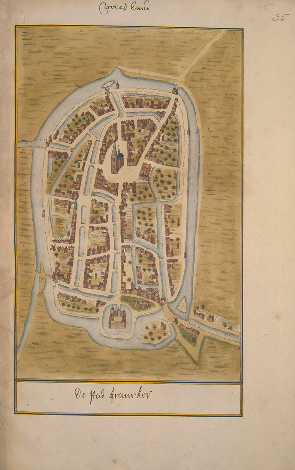 Korte Beschreijving van de Steden Dorpen Gehugten en Heeren-huizen der Heerlykheid Vriesland Benevens Desselfs Afbeeldingen Meest na 't leven getekent By een Vergaderdt Door Andries Schoemaker